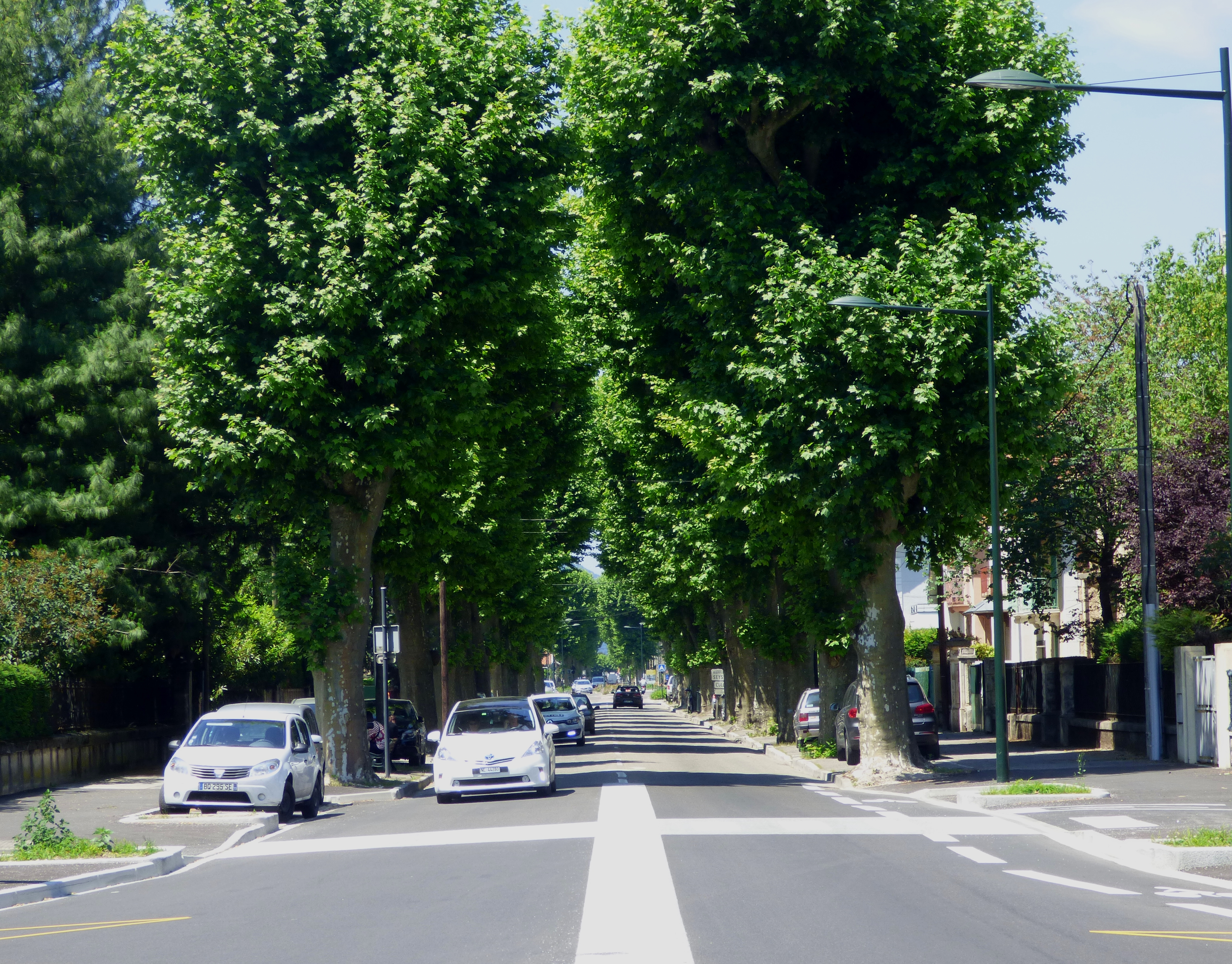 L'avenue du Grand Port à Aix-les-Bains (D991), en direction du lac du Bourget de la Chautagne.